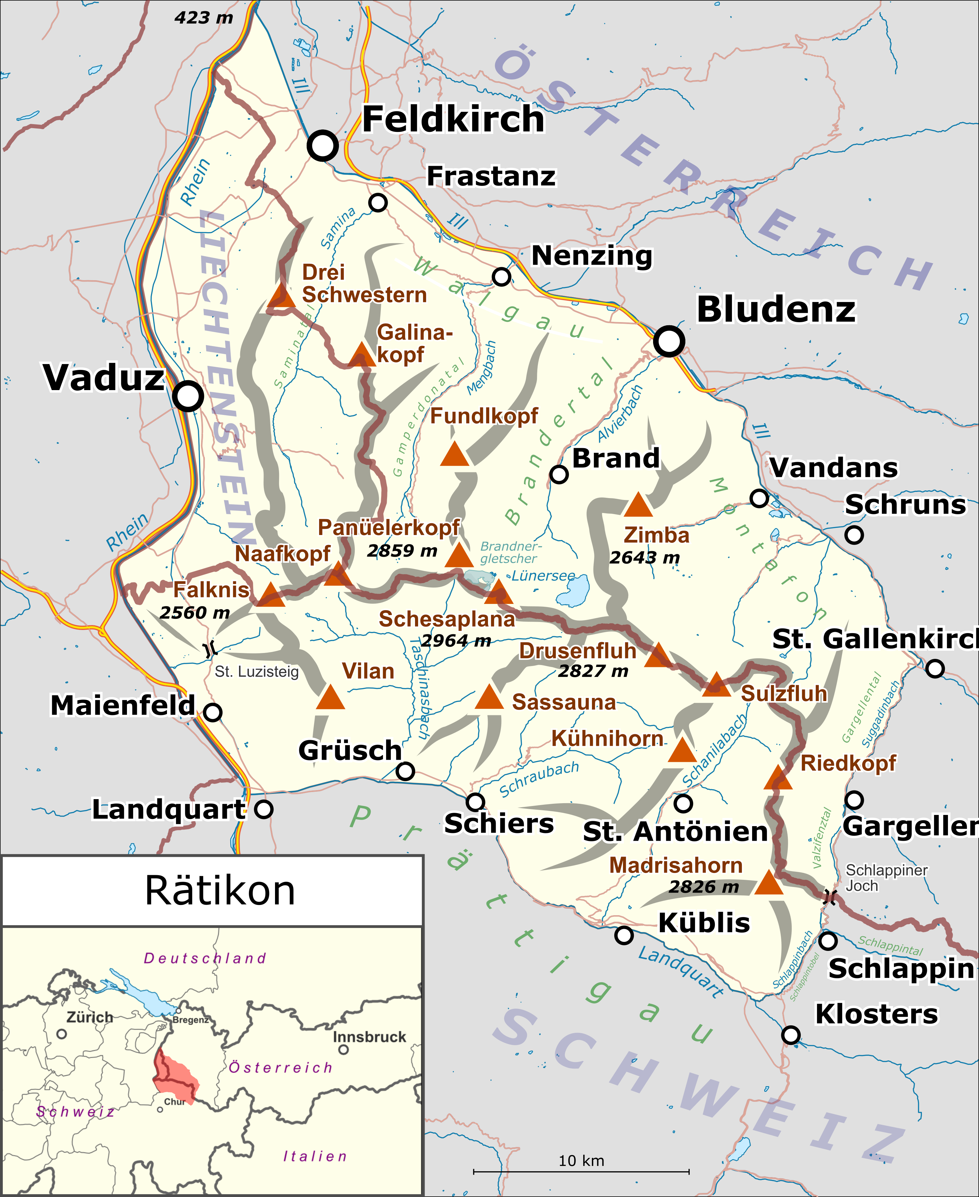 Lagekarte des Rätikon